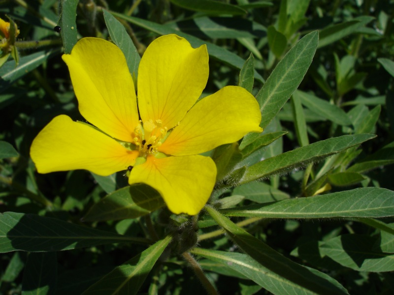 Ludwigia grandiflora subsp. hexapetala au Jardin des Plantes de Paris.